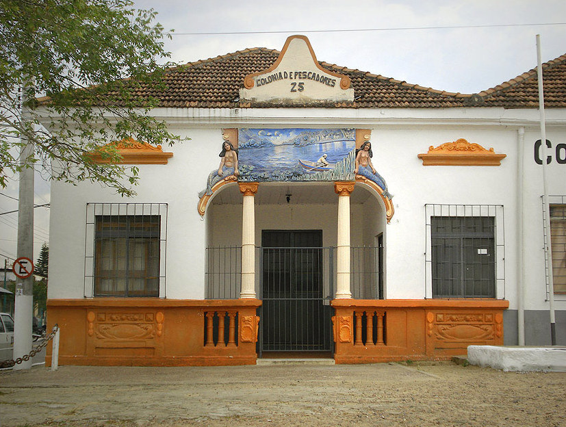 Ilha da Pintada, sede da colônia de pescadores. Porto Alegre, Brasil.